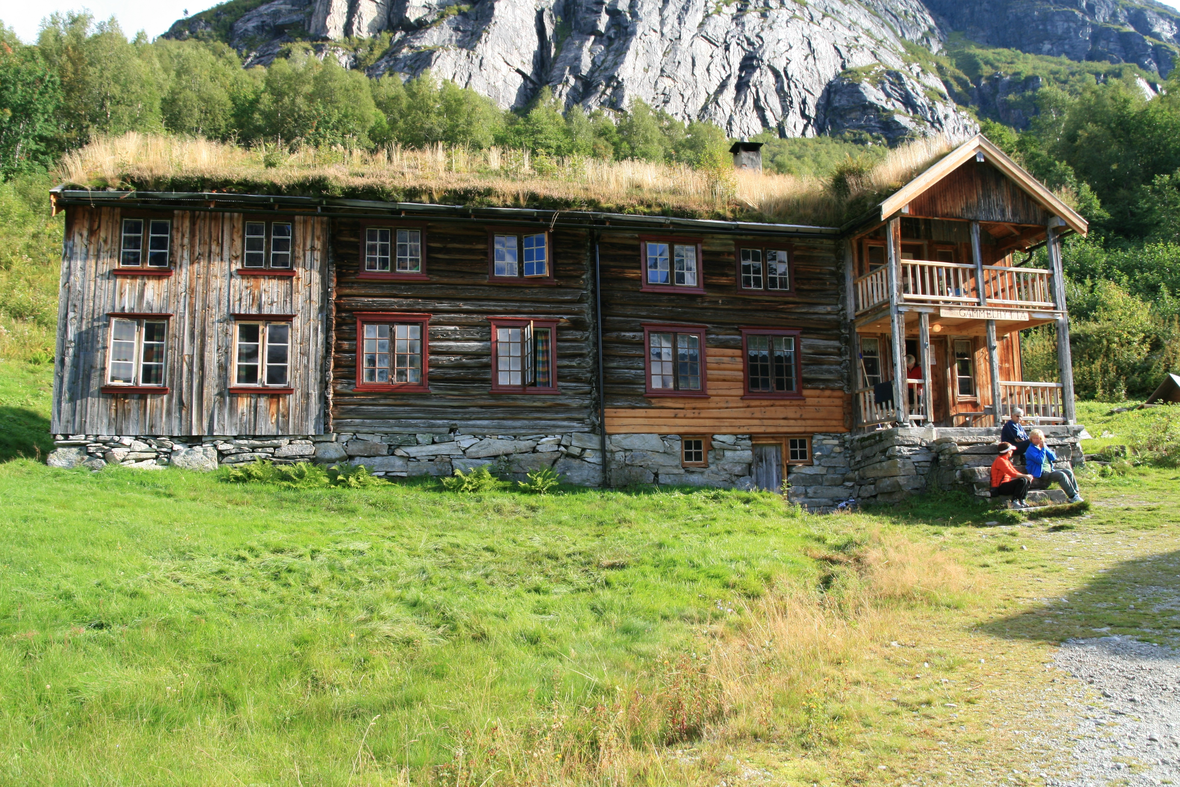 Innerdalshytta er en turisthytte i Innerdalen i Sunndal kommune i Møre og Romsdal fylke. Hytta er utgangspunkt for fjellturer til flere topper i Trollheimen, bl.a. Innerdalstårnet og Skarfjell.